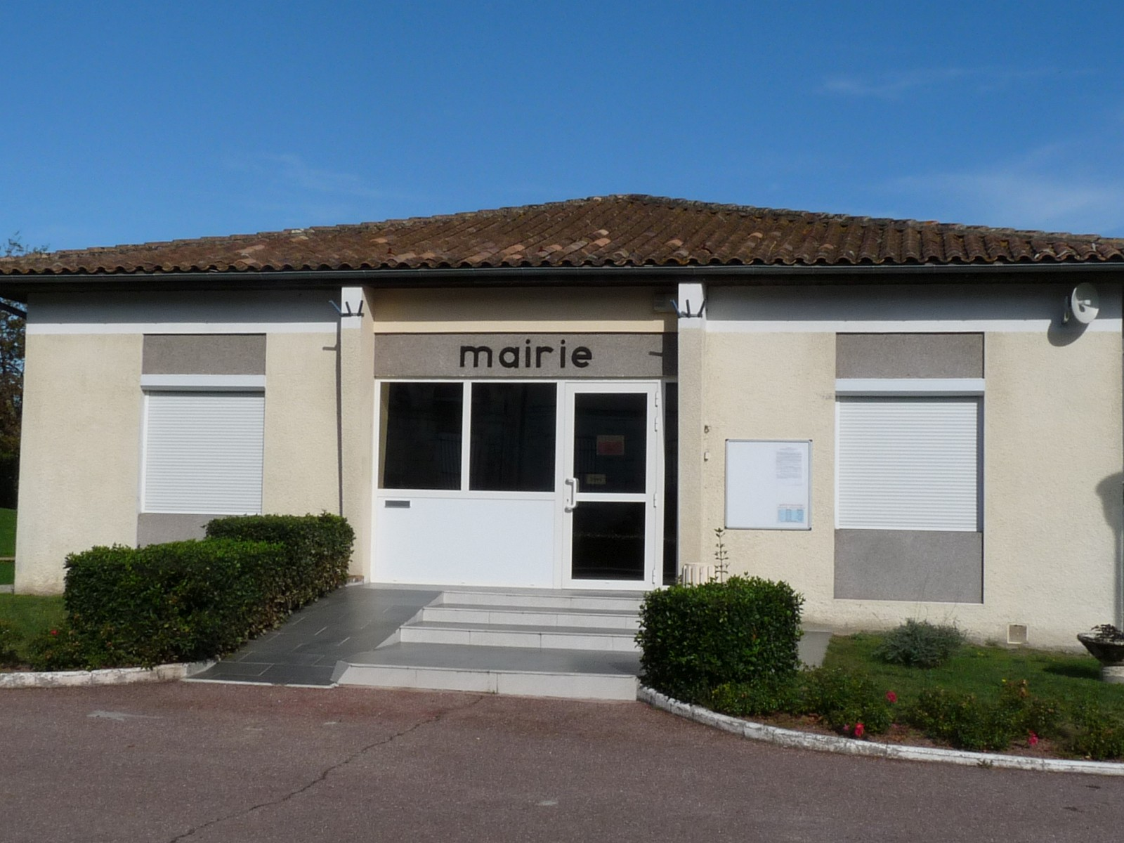 Mairie de Saint-Yzan-de-Soudiac, Gironde, France